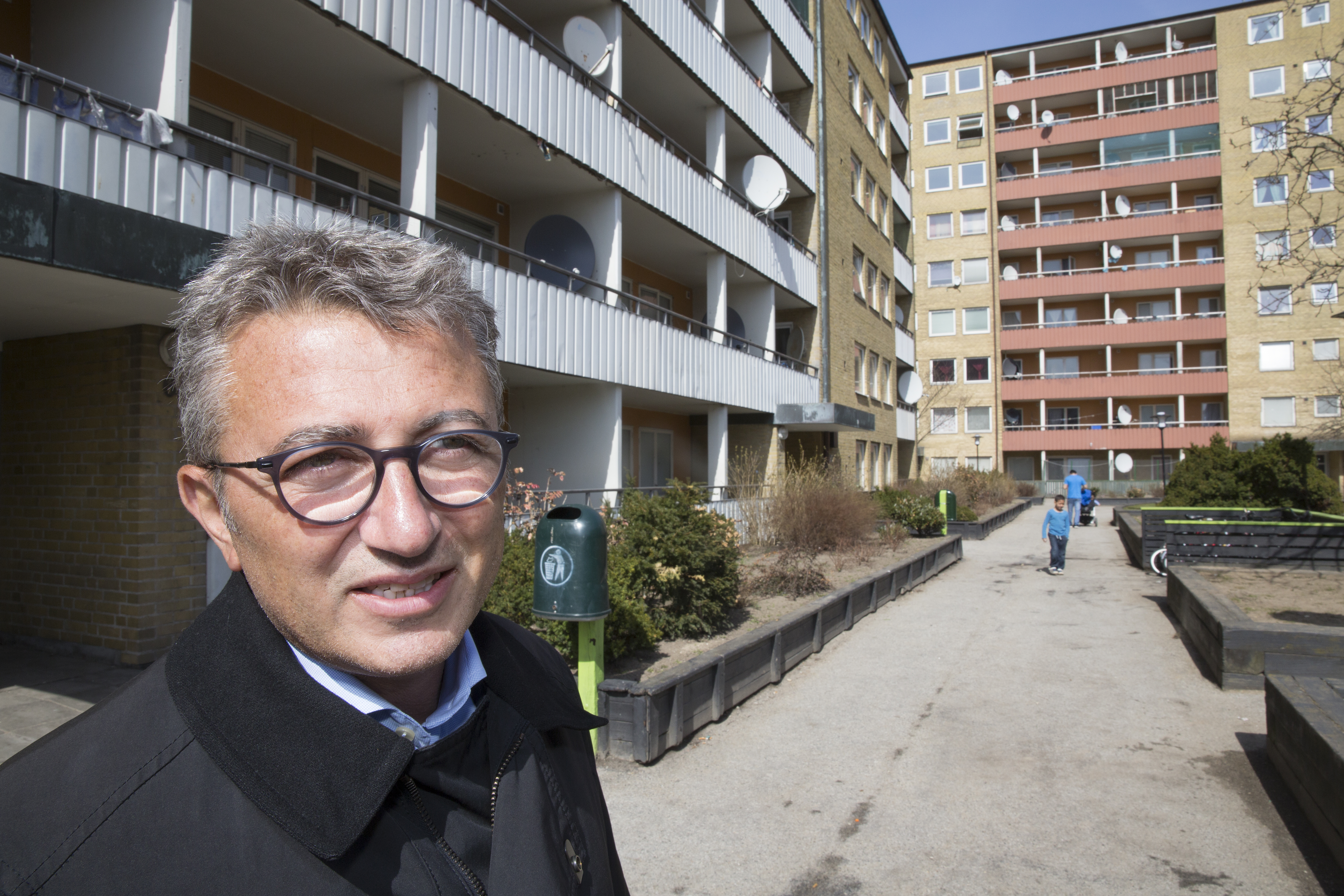 Greg Dingizian, vd och största ägare i fastighetsbolaget Victoria Park i Malmö fotograferad i bolagets nyförvärvade fastighetsbestånd i Herrgården, Rosengård, Malmö den 17 april 2013. Han har själv växt upp i en annan del av Rosengård - men också i den mera välbärgade stadsdelen Slottsstaden. Victoria Park driver ett exklusivt livsstilsboende i Limhamn i Malmö. Den 19 december 2012 köpte Victoria Park företaget Bostads AB Gröningen med 867 lägenheter i hårt slitna hyreshus på området Herrgården i Rosengård, Malmö. Foto: News Øresund – Johan Wessman. © News Øresund. Bilden får fritt publiceras under förutsättning att källa anges. The picture can be used freely under the prerequisite that the source is given. Originalfil tillhandahålles gratis, kontakta: News Øresund, Malmö, Sweden. News Øresund är en oberoende regional nyhetsbyrå som ingår i projektet Øresund Media Platform som drivs av Øresundsinstituttet i partnerskap med Lunds universitet och Roskilde Universitet och med delfinansiering från EU (Interreg IV A Öresund) och 14 regionala, icke kommersiella aktörer.